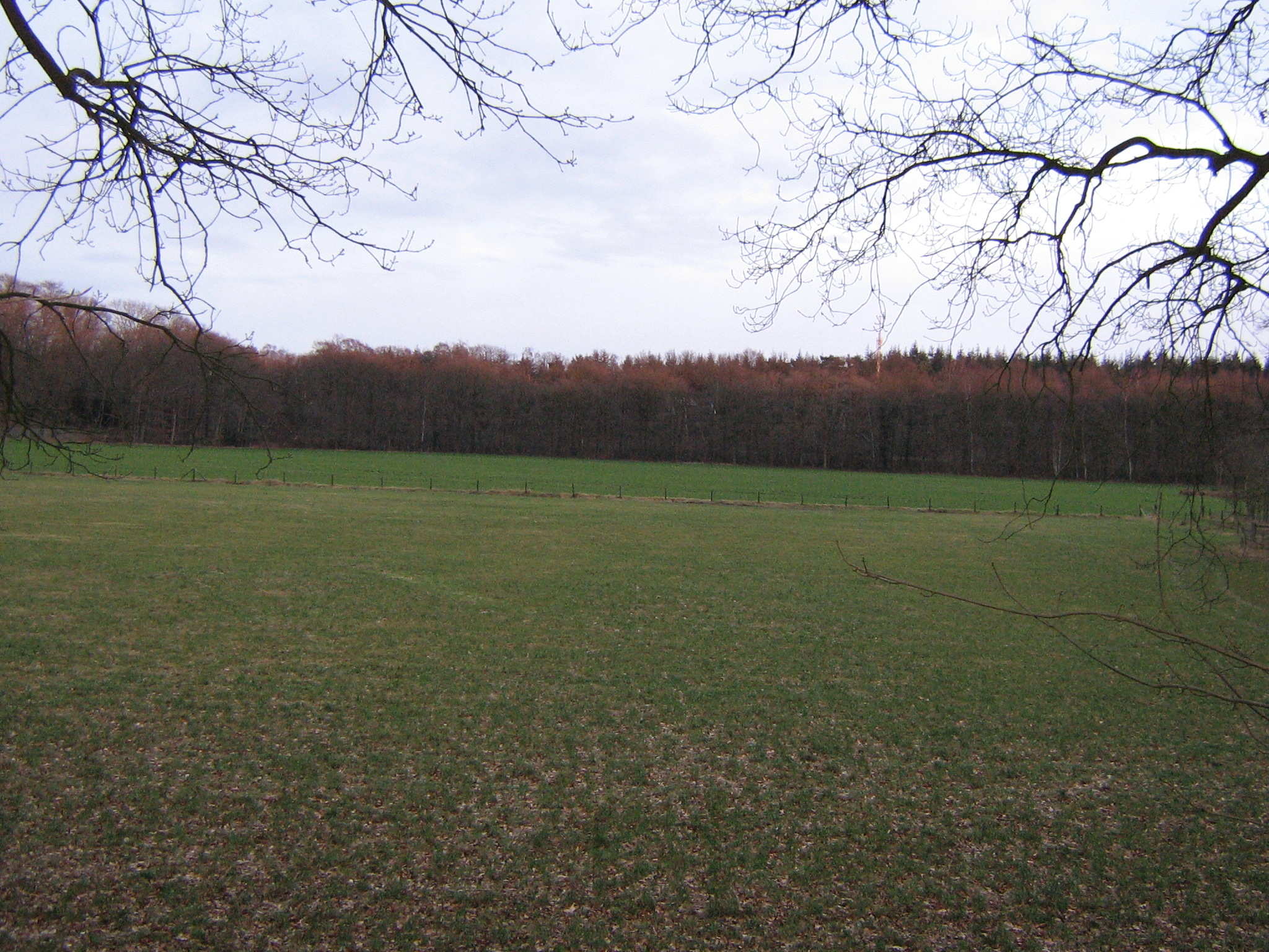 Goois landschapstype: wei omringd door aangeplant bos.